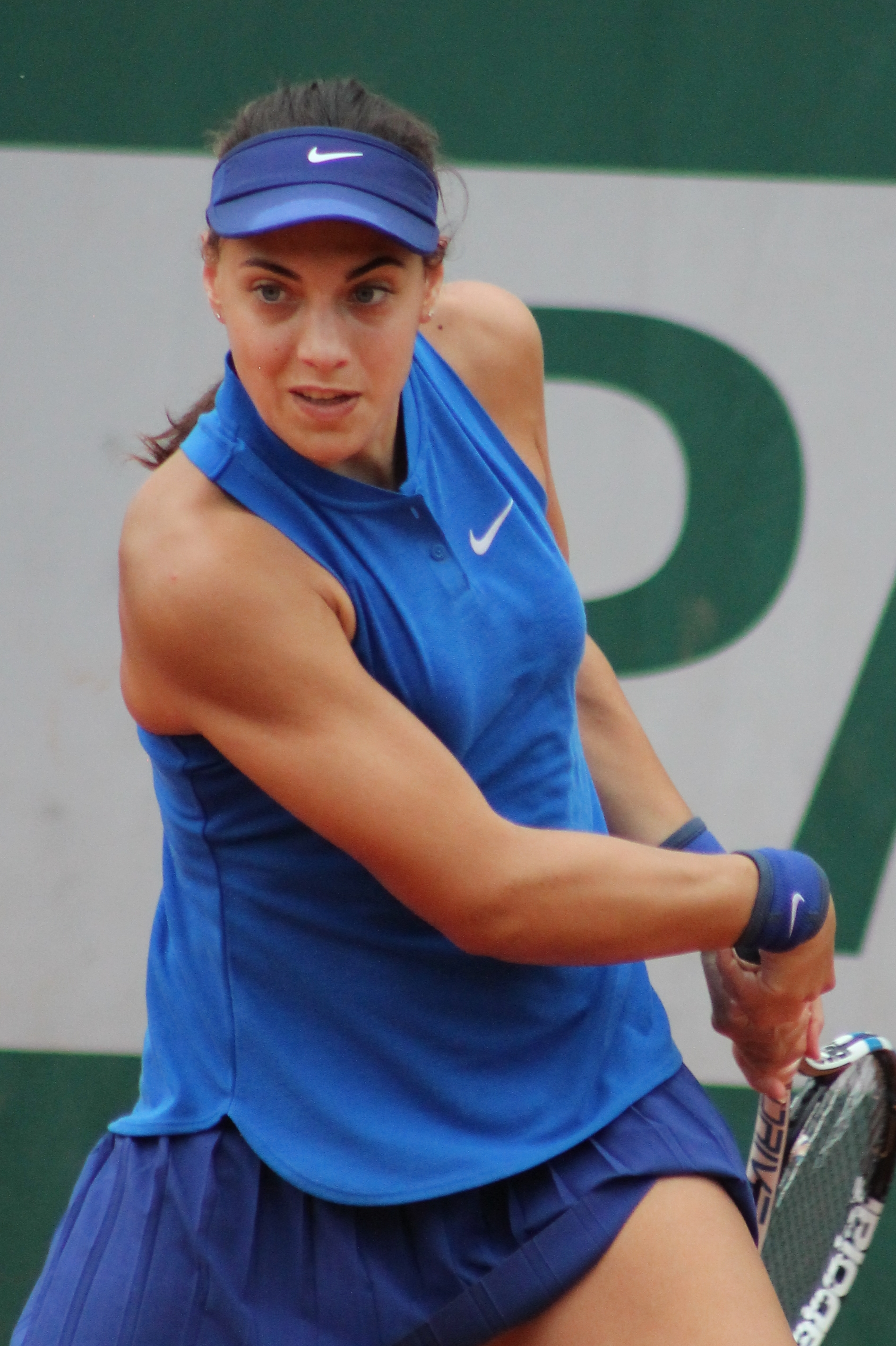 Konjuh RG16 (7)